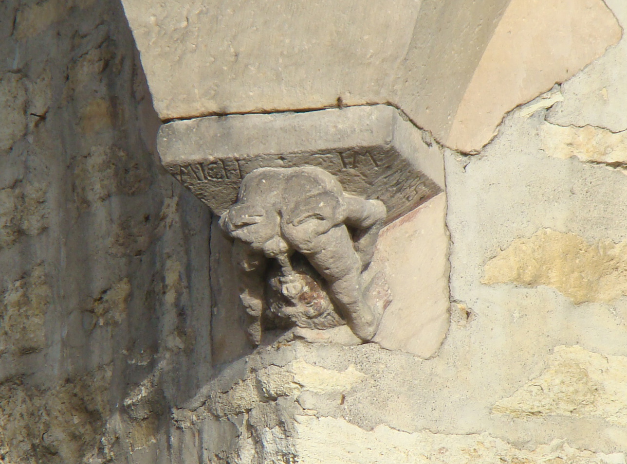 Oberschloss (Kranichfeld), Leckarsch